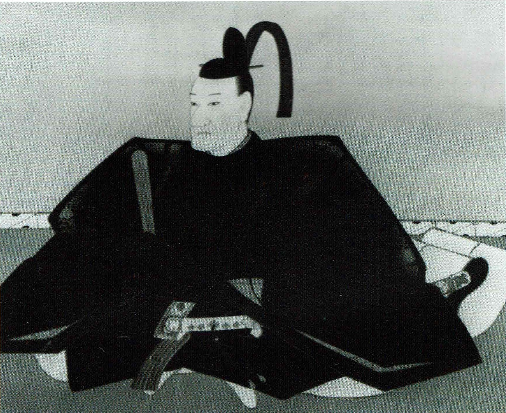 松平勝善の肖像。